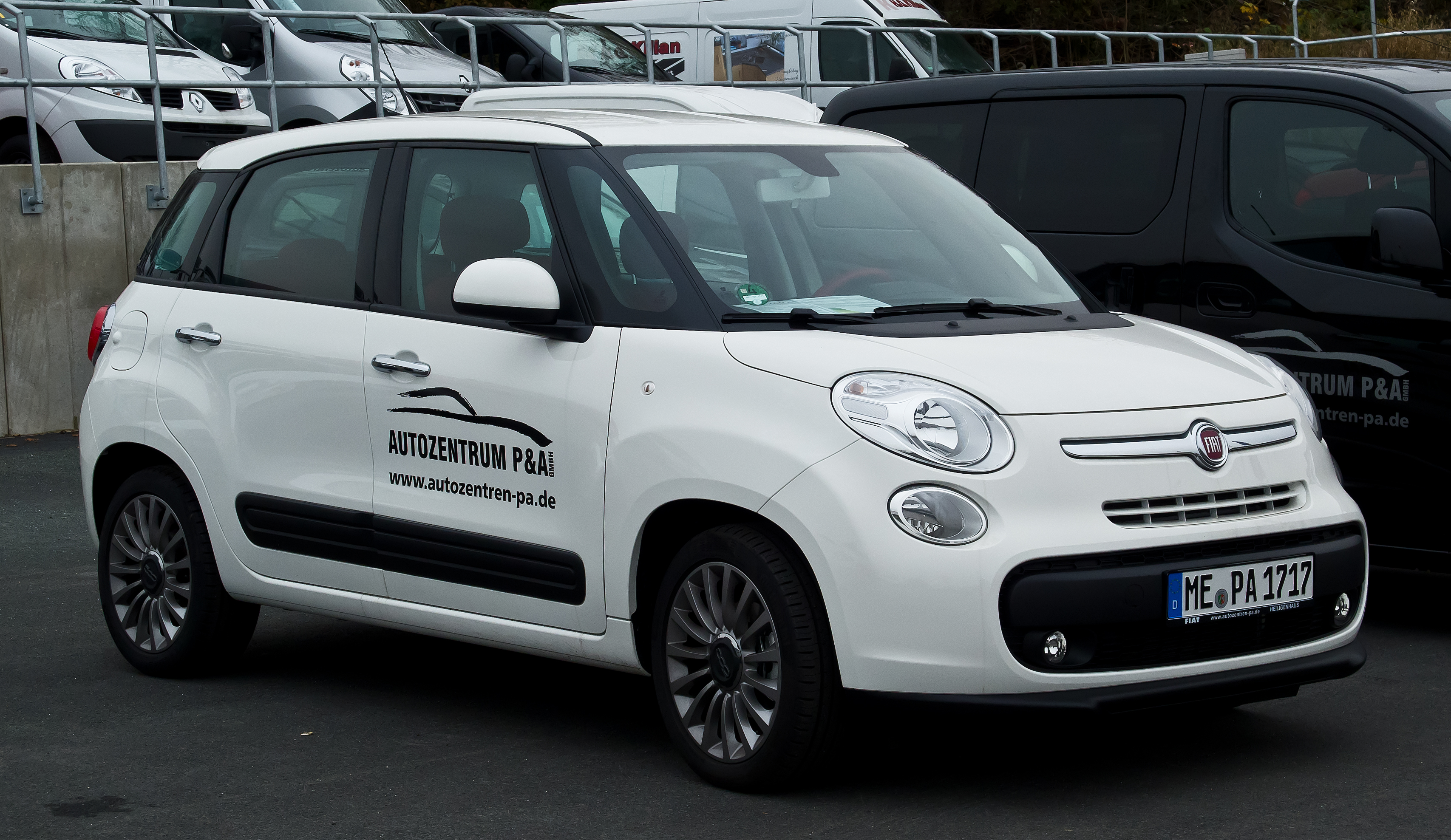 Fiat 500L 1.4 16V Easy